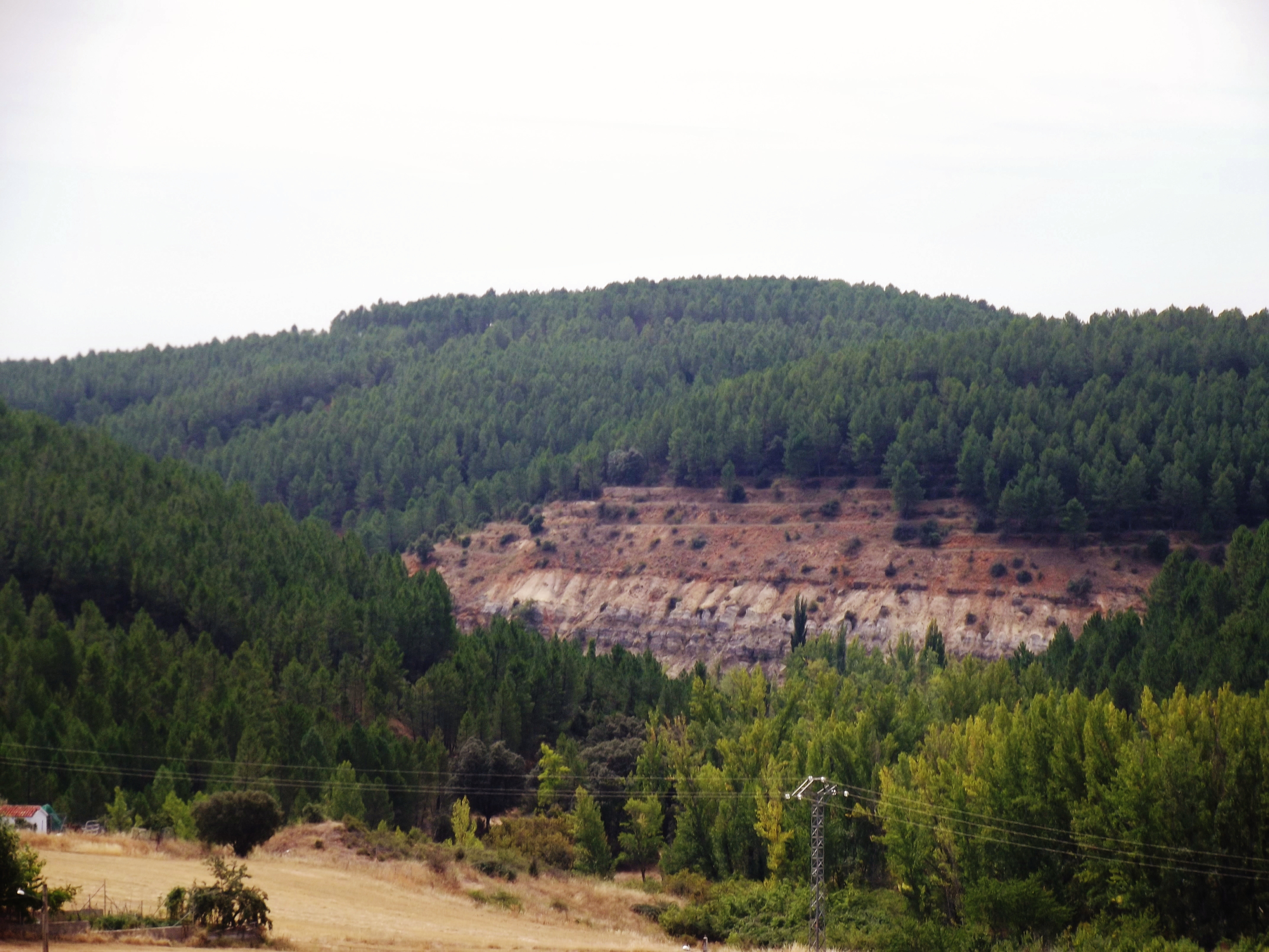 Repoblaciones en los alrededores de La Mierla, provincia de Guadalajara.